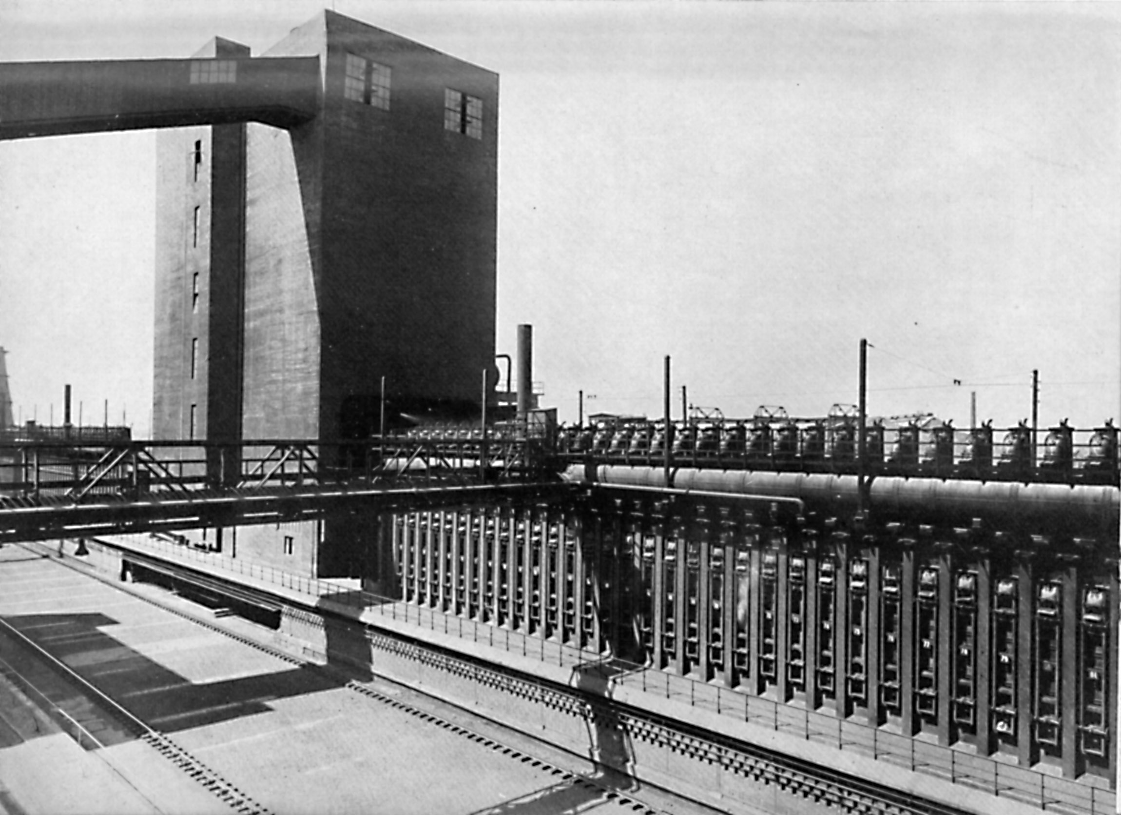 Coking plant: Source and Citation: Hoffmann, Heinrich (1953). Die chemische Veredlung der Steinkohle durch Verkokung, In: Stauber, Konstantin (ed.) Band "Steinkohle" der Westdeutschen Wirtschafts-Monographien, Verlag Köln-Lindenthal, Folge 1, 164 pp, 1, 1-27, -Koksofenbatterie mit Vorlauf